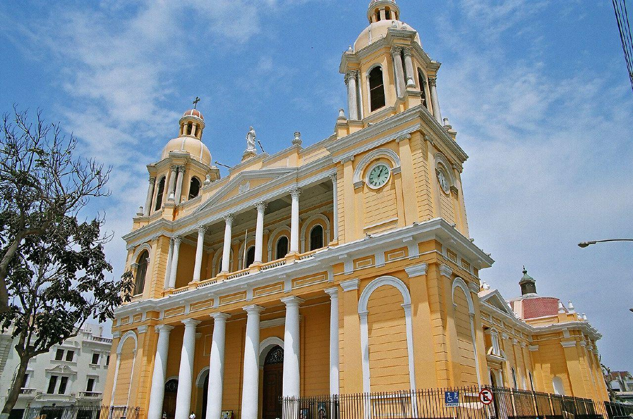 CHICLAYO